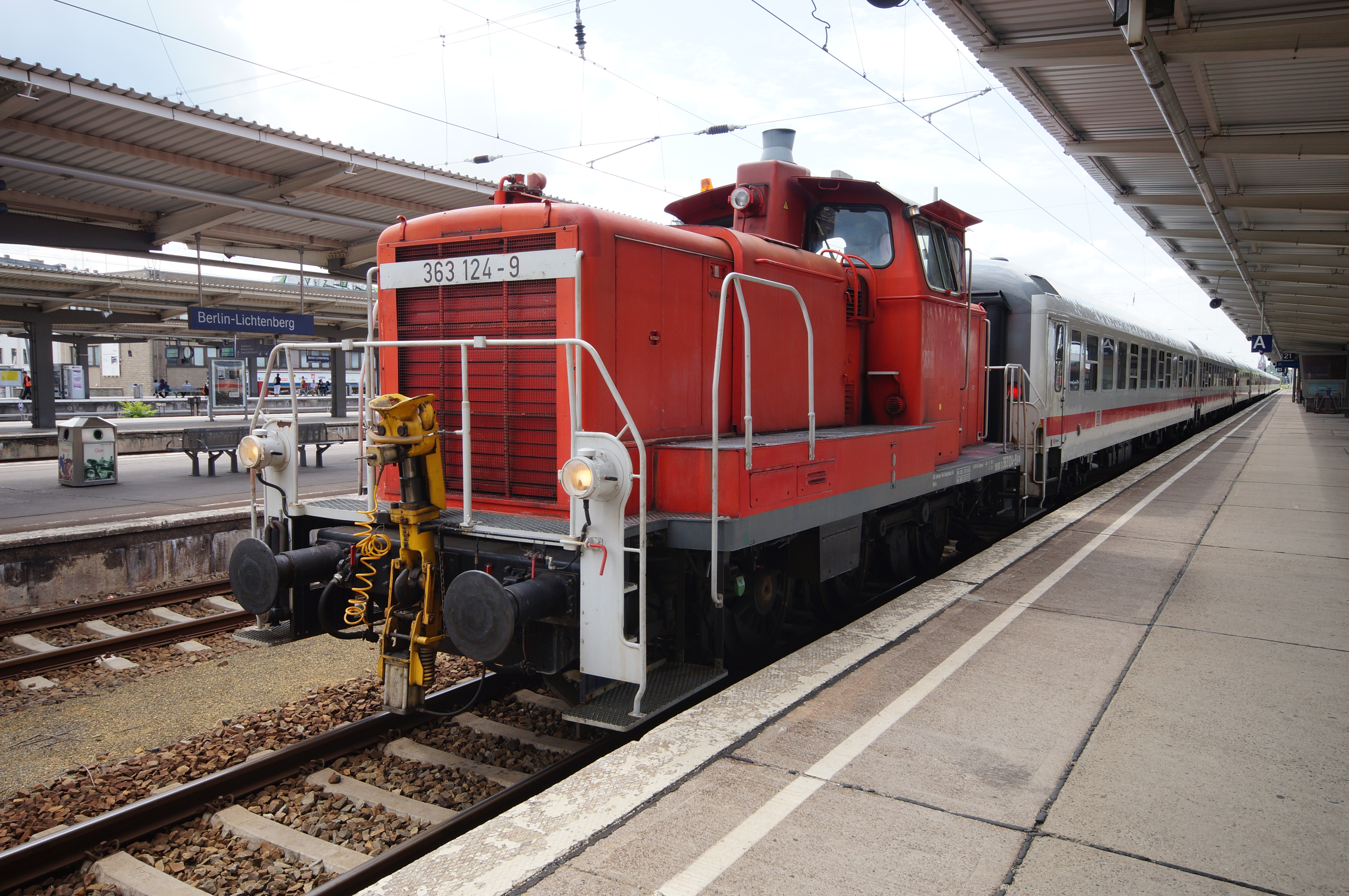 Die Diesellokomotive 363 124-9 der DB-Baureihe V 60 in schwerer Bauart im Bahnhof Berlin-Lichtenberg.